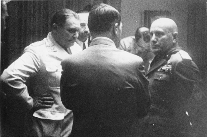 Münchener Abkommen, Hitler, Göring, Mussolini ADN-Zentralbild/ Archiv DieMünchener Konferenz am 29.9.1938 Die Teilnehemer der Konferenz A.N. Chamberlain, Edouard Daladier, Adolf Hitler und Benito Mussolini legen in einem Abkommen die Abtretung des tschechoslowakischen grenzgebietes an Deutschland bis zum 10.10.fest. U.B.z.: Unterredung zwischen Hitler und Mussolini während der Verhandlungen. v.l. Hermann Göring, Heinrich Himmler, Hitler, Rudolf Heß und Mussolini. [Scherl Bilderdienst] Abgebildete Personen: Göring, Hermann: Reichsmarschall, Oberbefehlshaber der Luftwaffe, Ministerpräsident von Preußen, Deutschland Mussolini, Benito: Ministerpräsident, Regierungschef, Chef des Faschistischen Großrates, Italien Hitler, Adolf: Reichskanzler, Deutschland